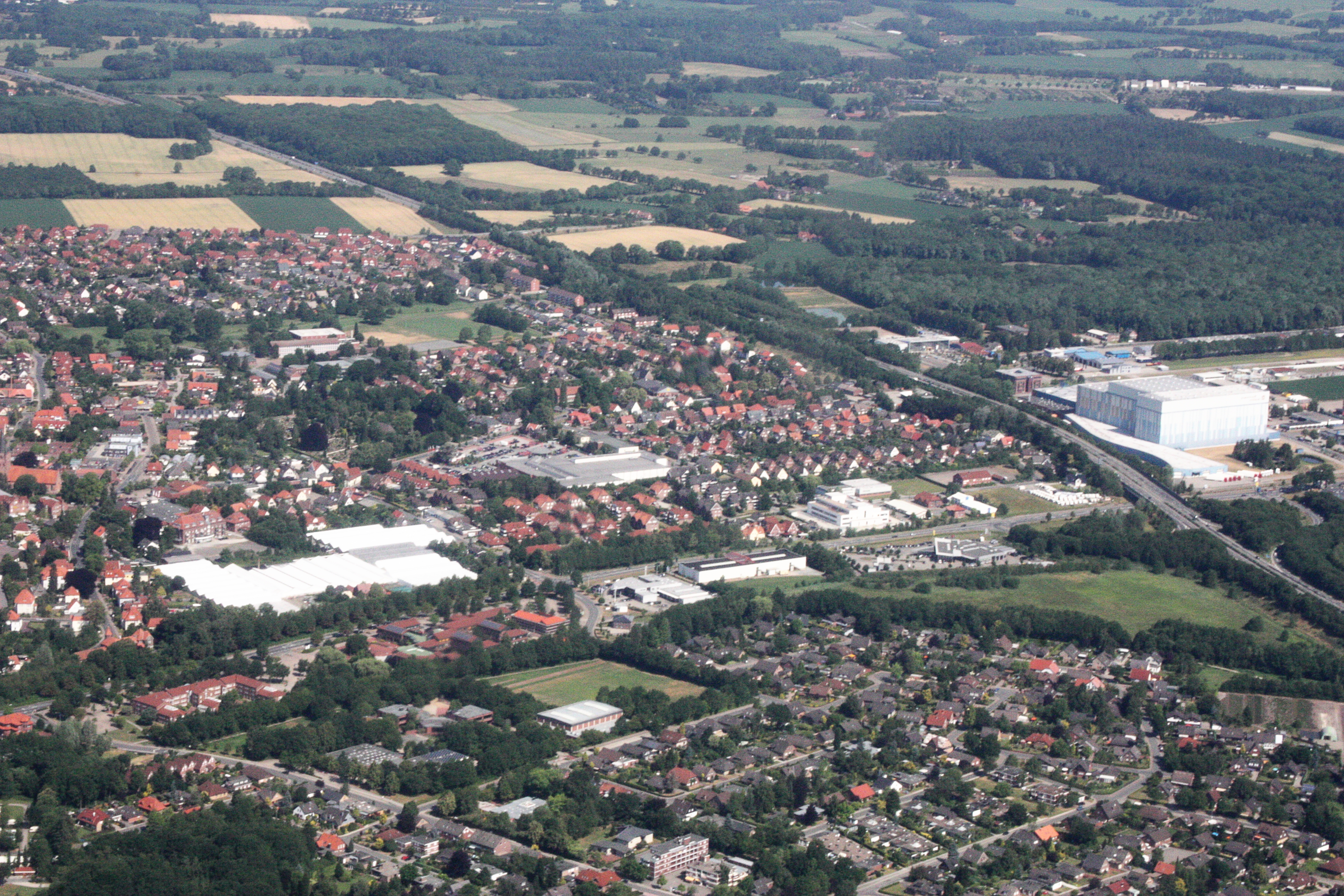 Luftaufnahme; Flug von Bad Zwischenahn nach Westerstede; Flughöhe 1500 ft; Juli 2010; Originalfoto bearbeitet: Tonwertkorrektur und Bild geschärft mit Hochpassfilter